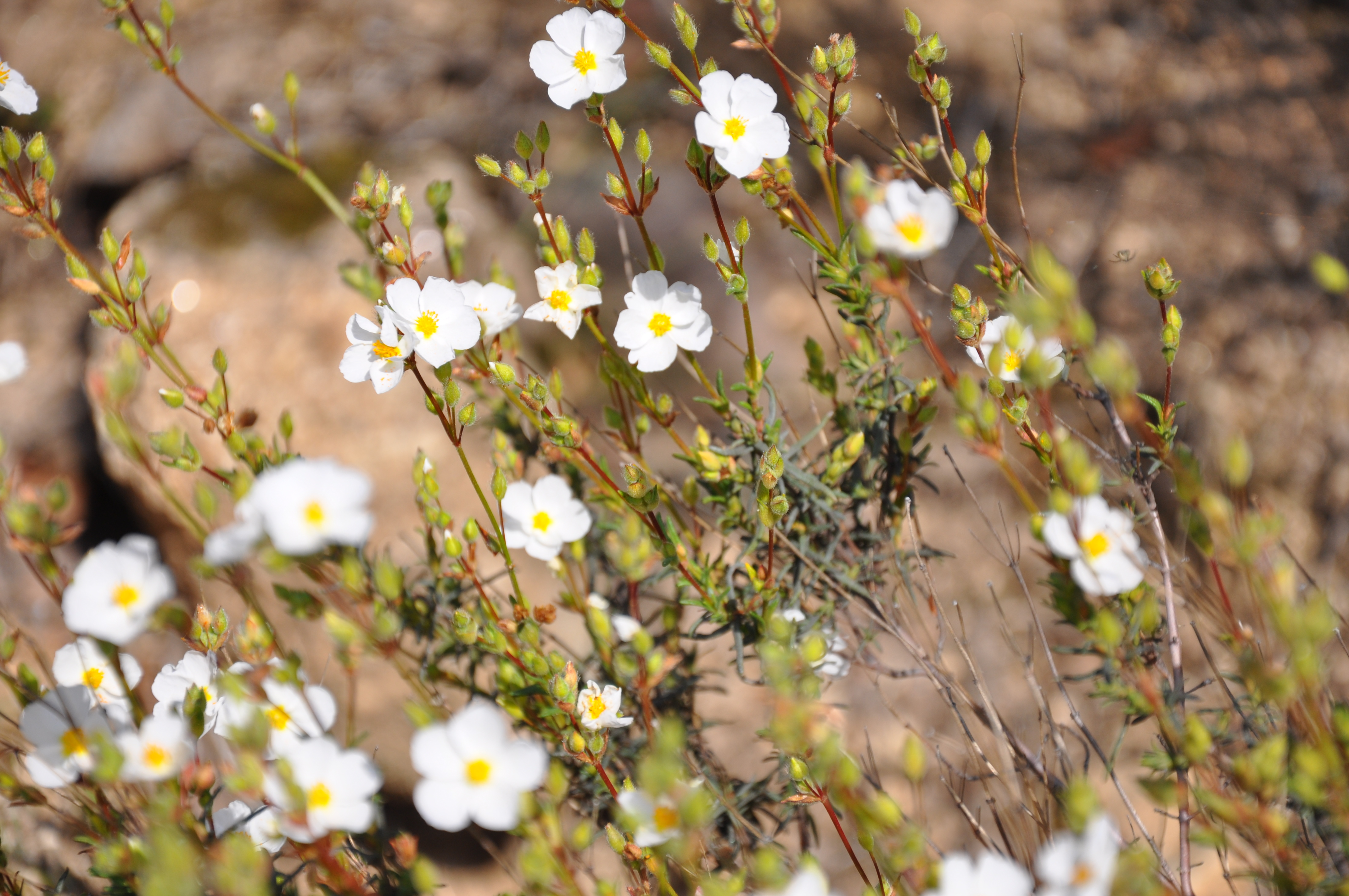 Jaguarcillo (Halimium umbellatum), Picote, Portugal.